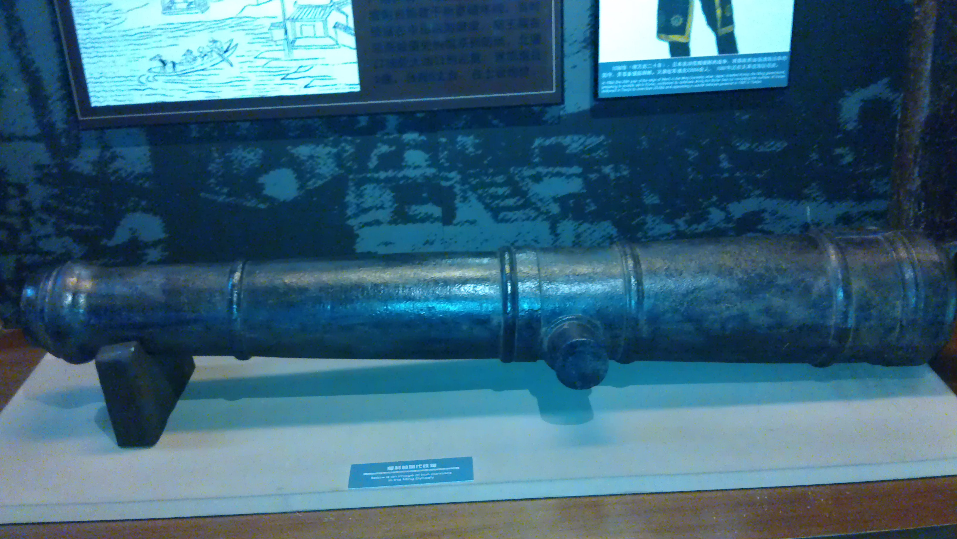 大沽口炮臺：明代鐵炮（1